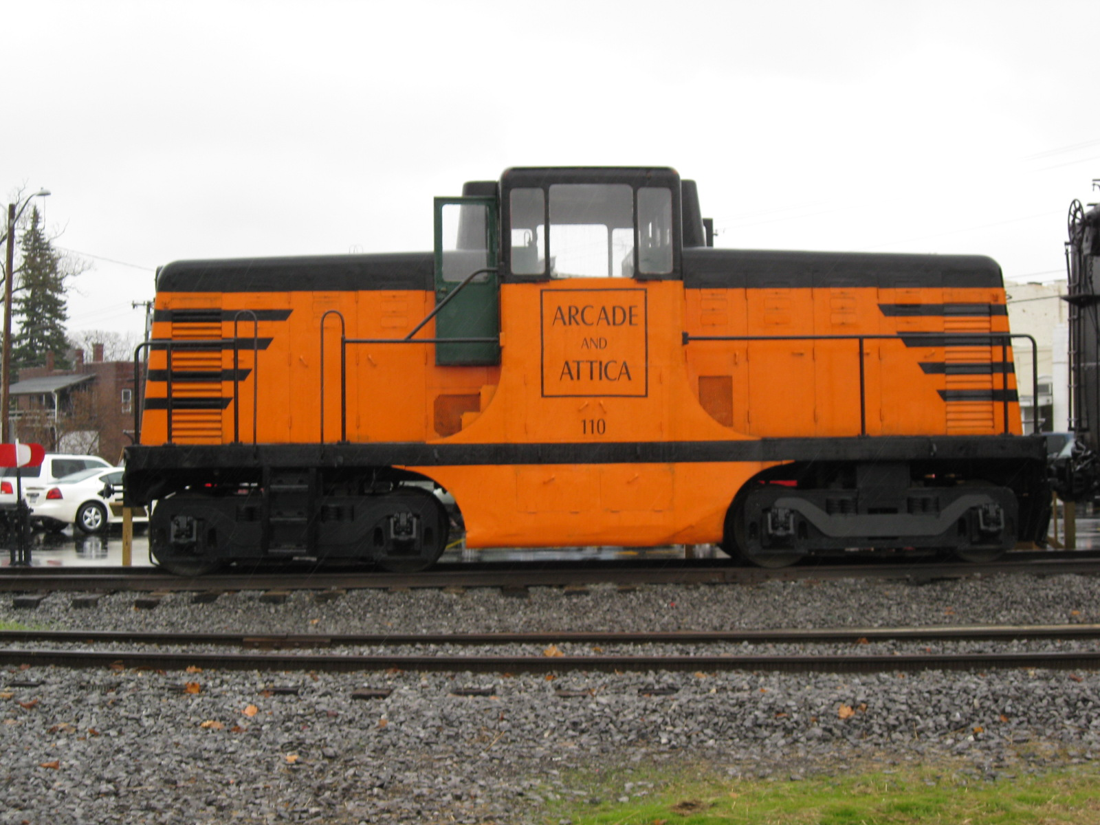 Arcade and Attica No. 110 GE 44-ton